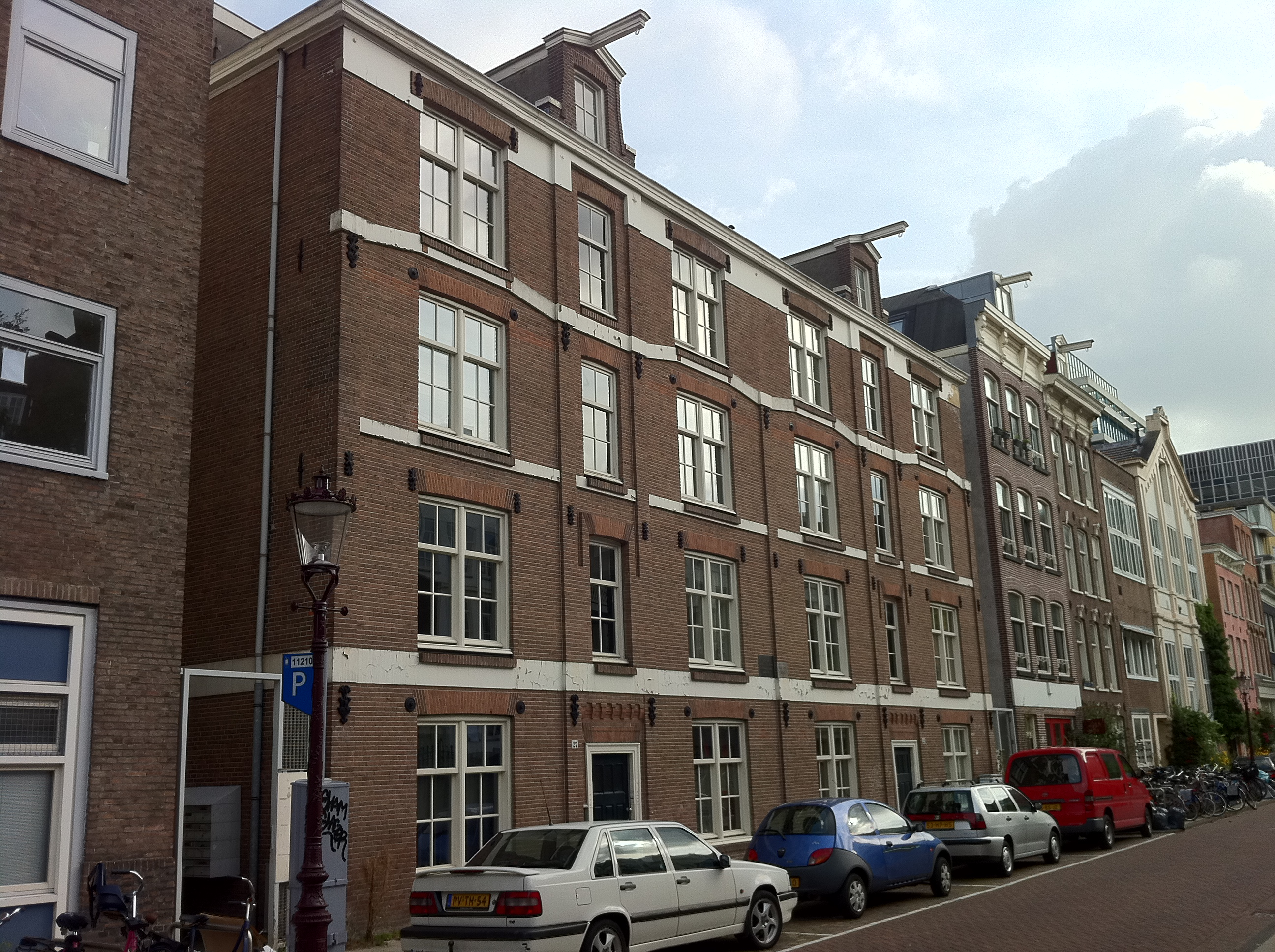 Woningbouwcomplex Vereniging Salerno Valckenierstraat 23-33 Amsterdam. De vereniging Salerno, in 1853 opgericht, gaf Leliman op 3 juli 1854 opdracht tot het ontwerp van 48 arbeiderswoningen op een terrein bij het Weesperplein, thans Valckenierstraat. Leliman ontwierp twee vrijstaande blokken van vier verdiepingen, een voorgebouw aan de gracht met 16 woningen en een achtergebouw met 32 woningen.